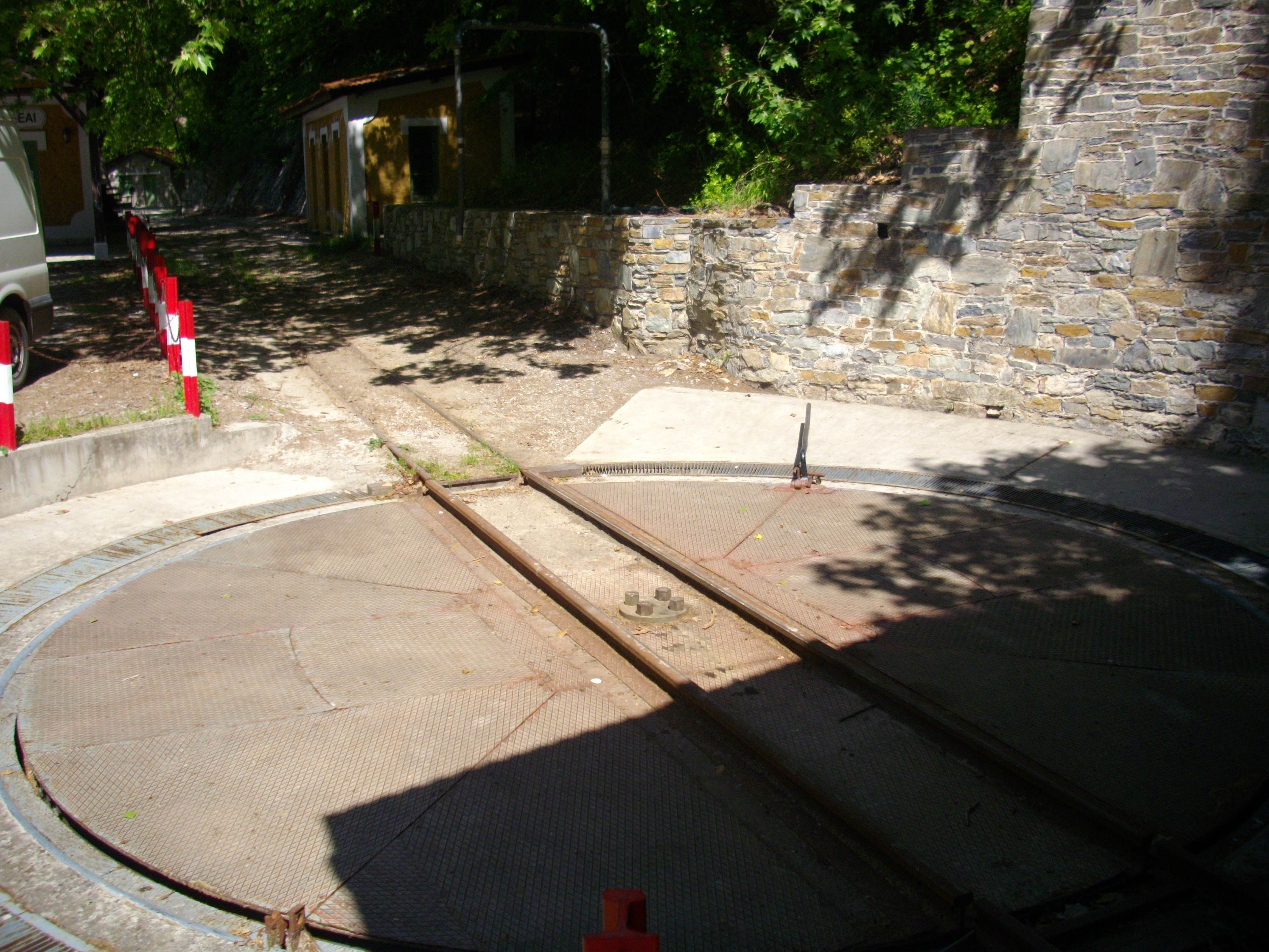 Engine reversing platform, Milee, Pilion, Greece